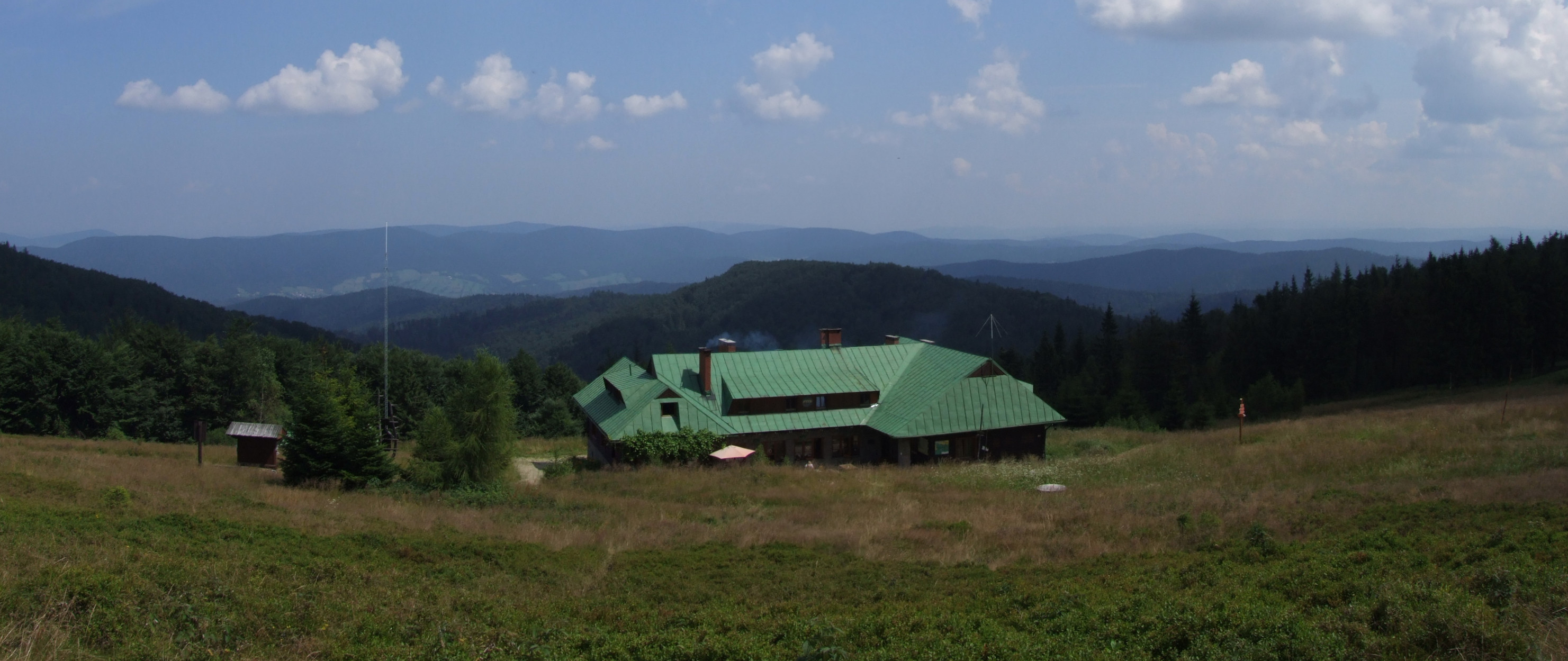 Łabowska Hala i panorama widokowa na Beskid Niski